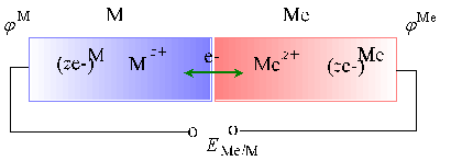 A kontaktpotenciál értelmezése fém-fém között. Az 1. ábra a Termoelem szócikkhez